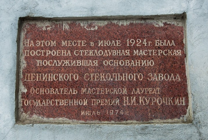 Мемориальная табличка на фасаде здания стекольного завода в Царицыне